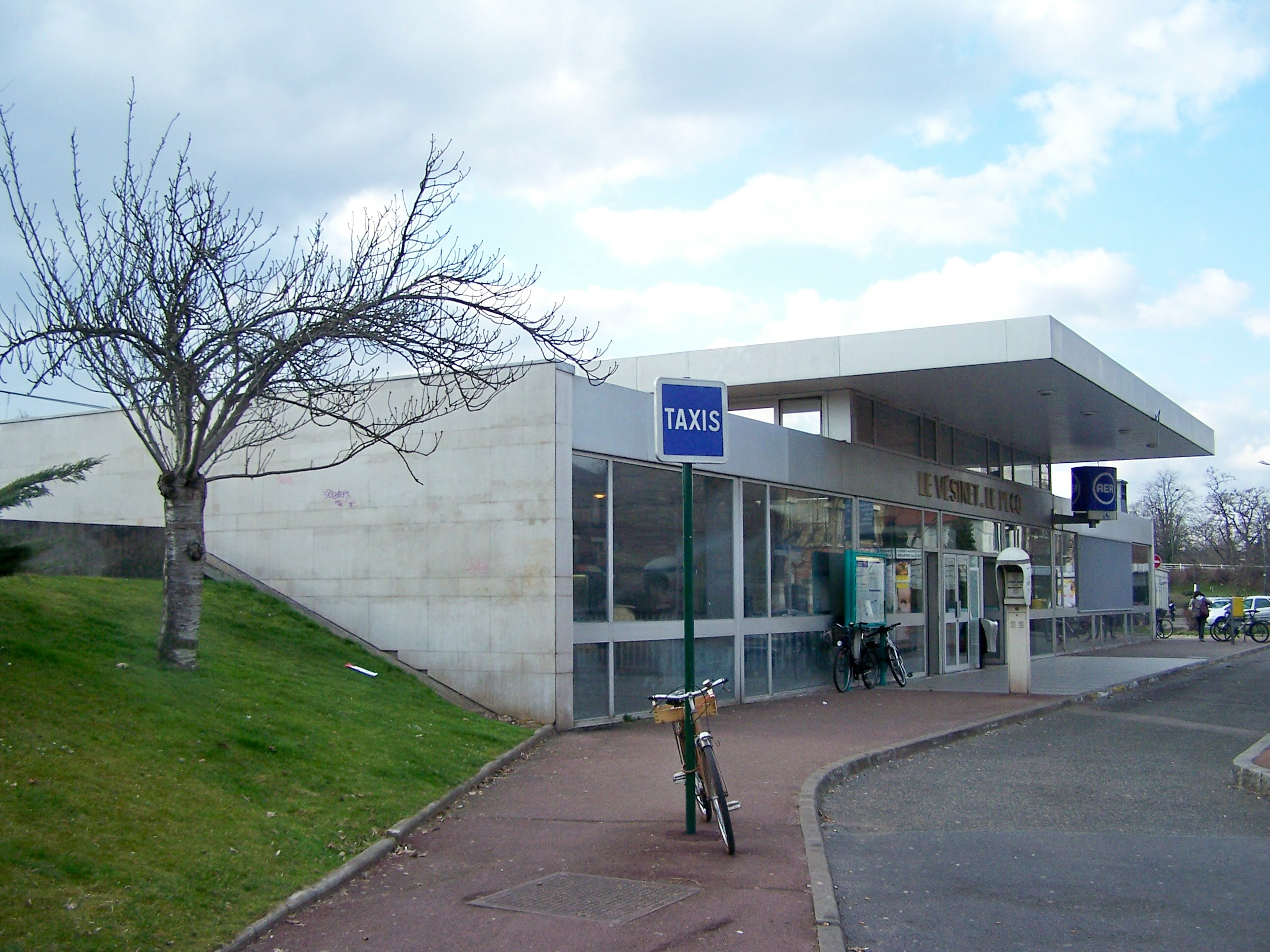 Gare du Vésinet - Le Pecq au Vésinet, Yvelines, France